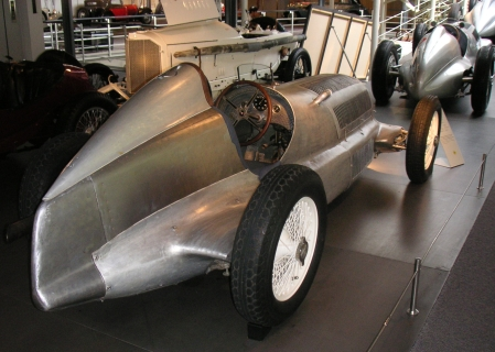 Rückansicht Mercedes Silberpfeil W25 von 1934, fotografiert von Daniel Wimpff im Mercedes-Benz-Museum Stuttgart Untertürkheim im September 2004, Lizenz:Gnu-FDL (Im Hintergrund rechts teilweise zu sehen, die Rückansicht des Silberpfeil W125 von 1937)